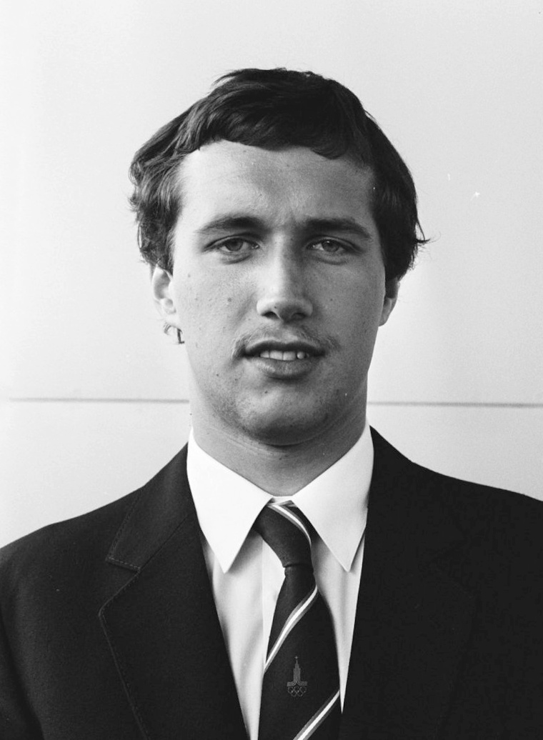 Eric Noordegraaf